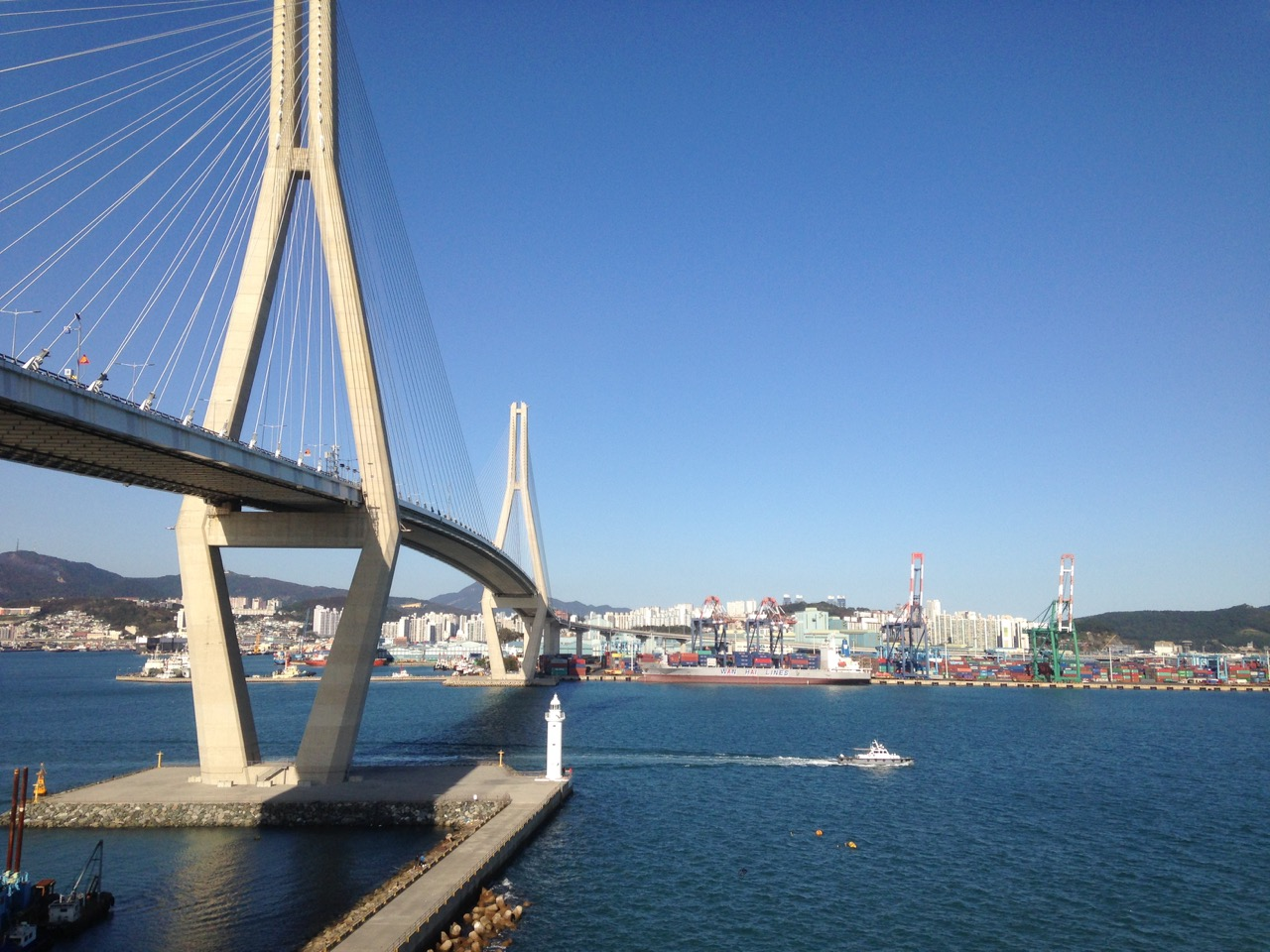 Blick entlang der Brücke über den Handelshafen von Busan, Südkorea, auf das gegenüberliegende Container-Terminal